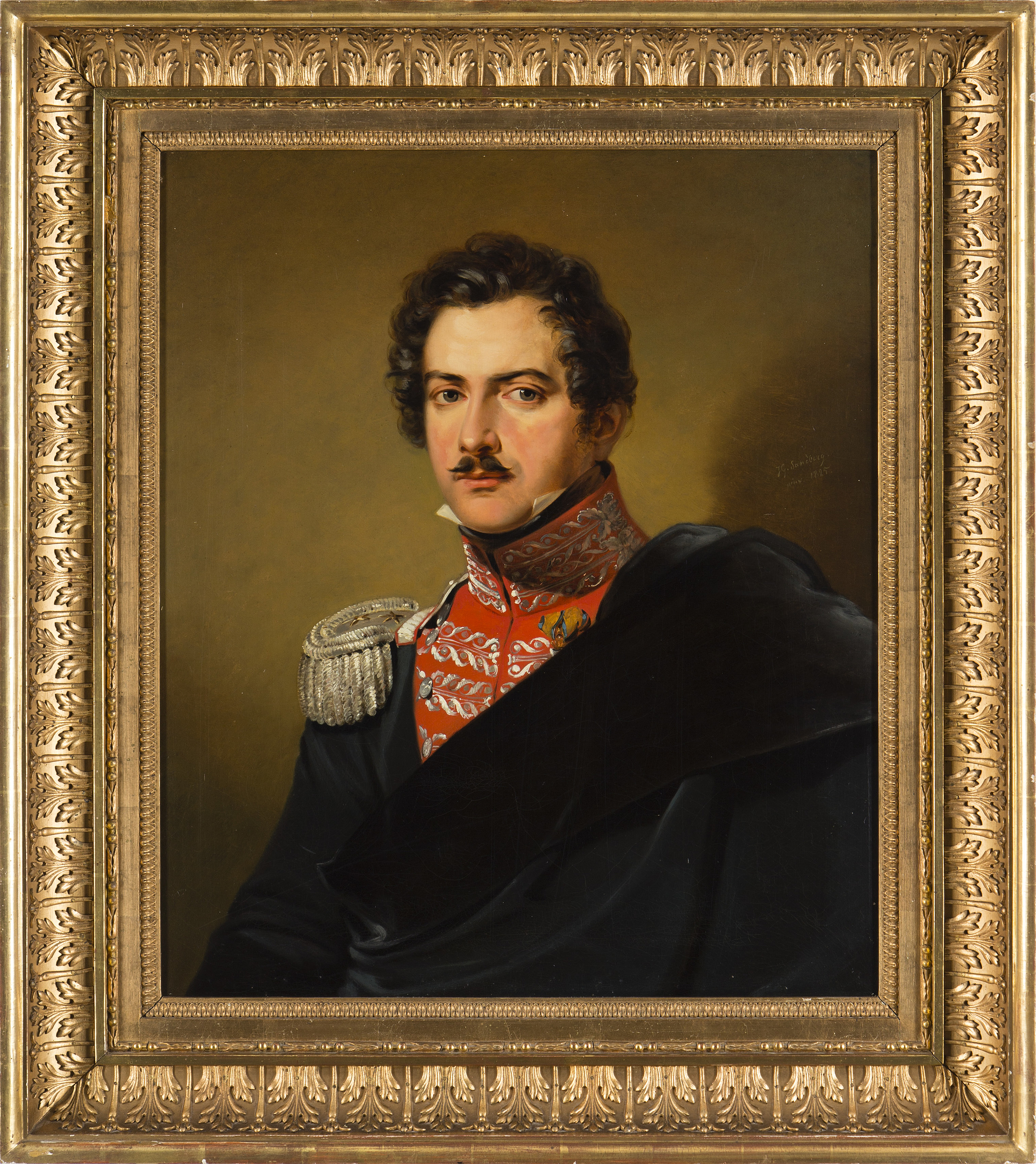 Robert Fredrik von Kramer i Andra Gardesregementets (Göta Livgarde)) uniform, med Svärdsordens riddartecken på bröstet. Målning från 1825 av Johan Gustaf Sandberg.